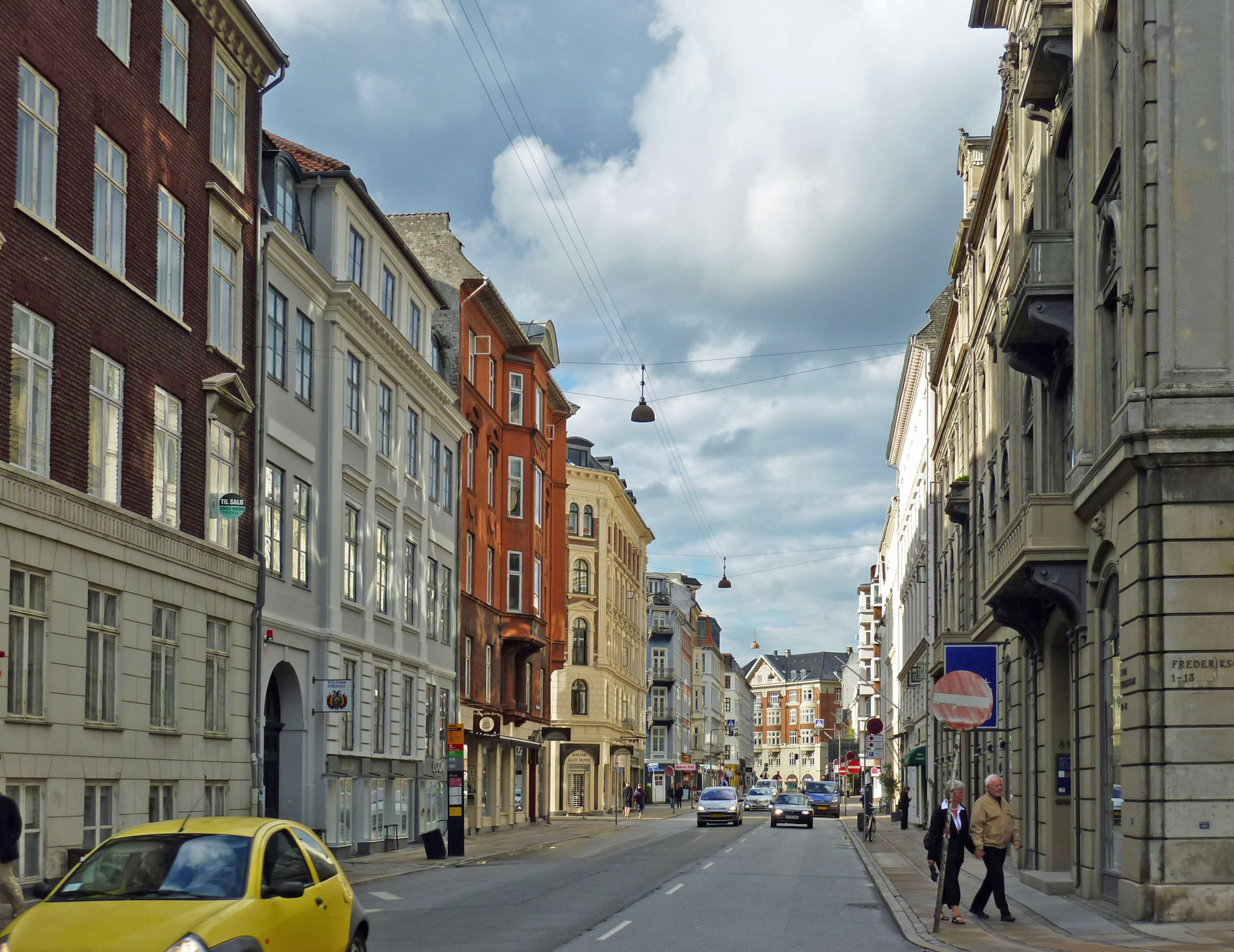 Bredgade, a street in the Frederiksstaden district of central Copenhagen, Denmark